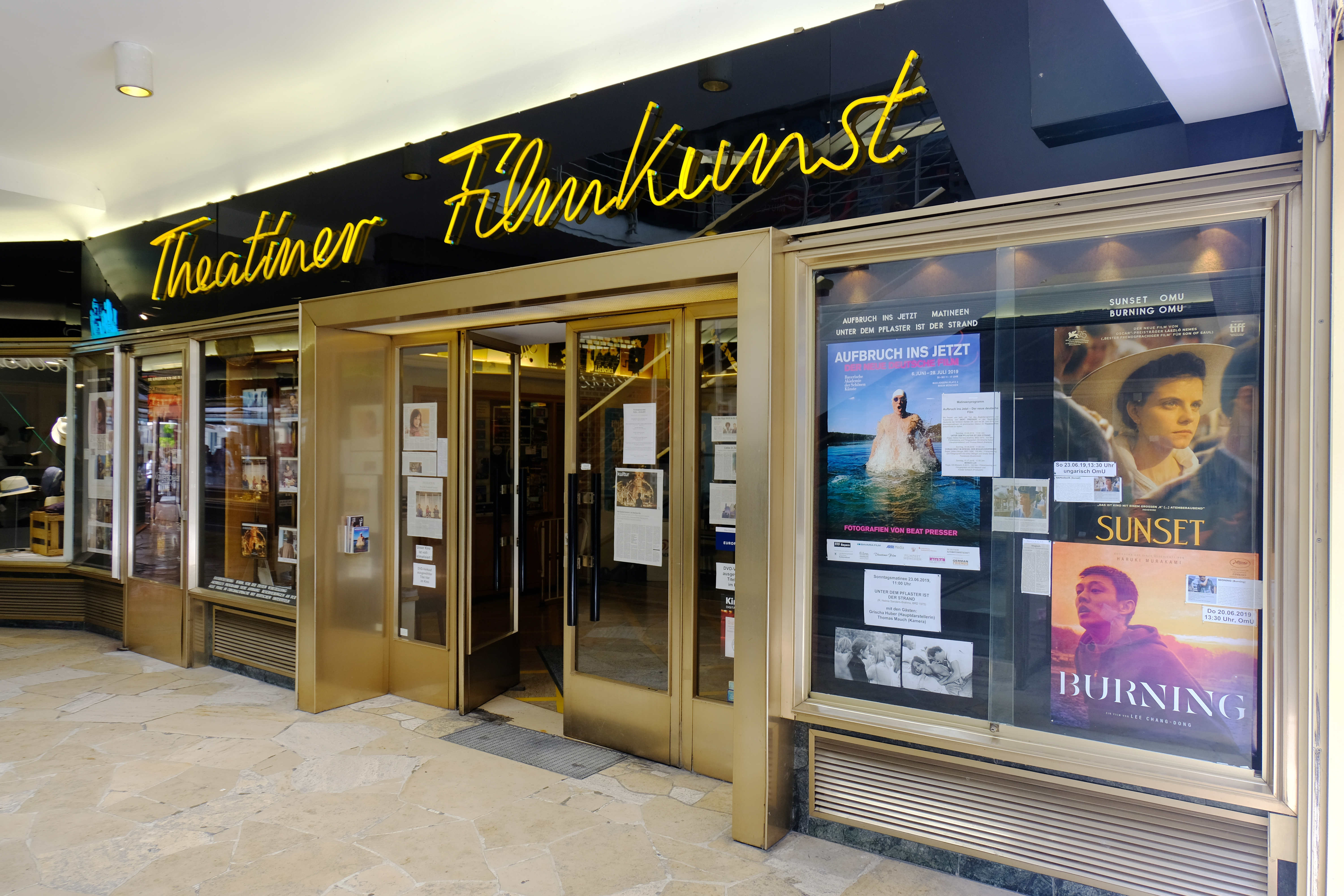 Eingang des Kinos „Theatiner Filmkunst“ in der Münchner Theatinerstraße (2019)